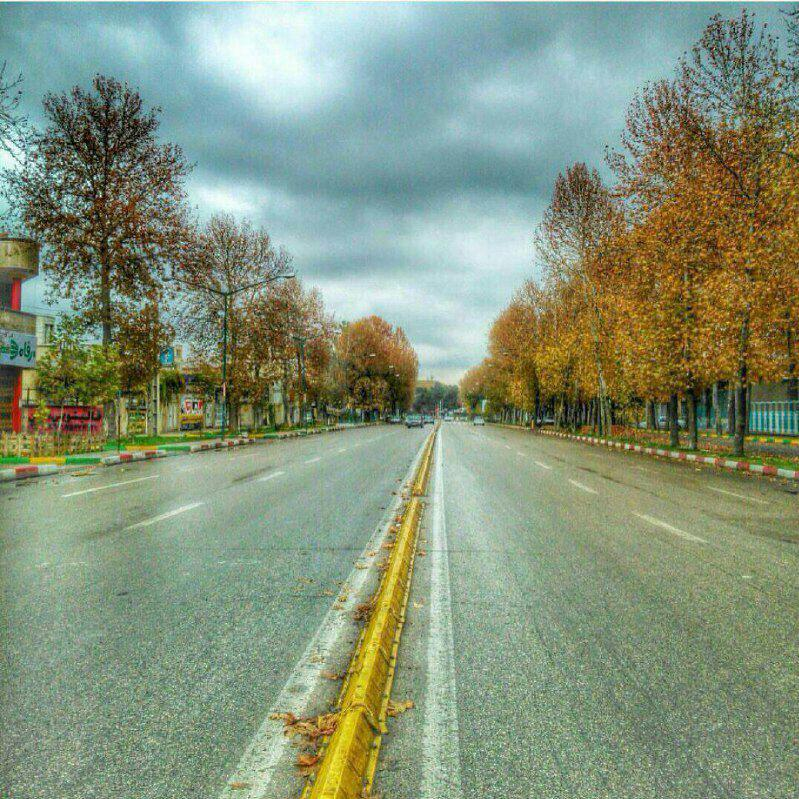 shahrdari